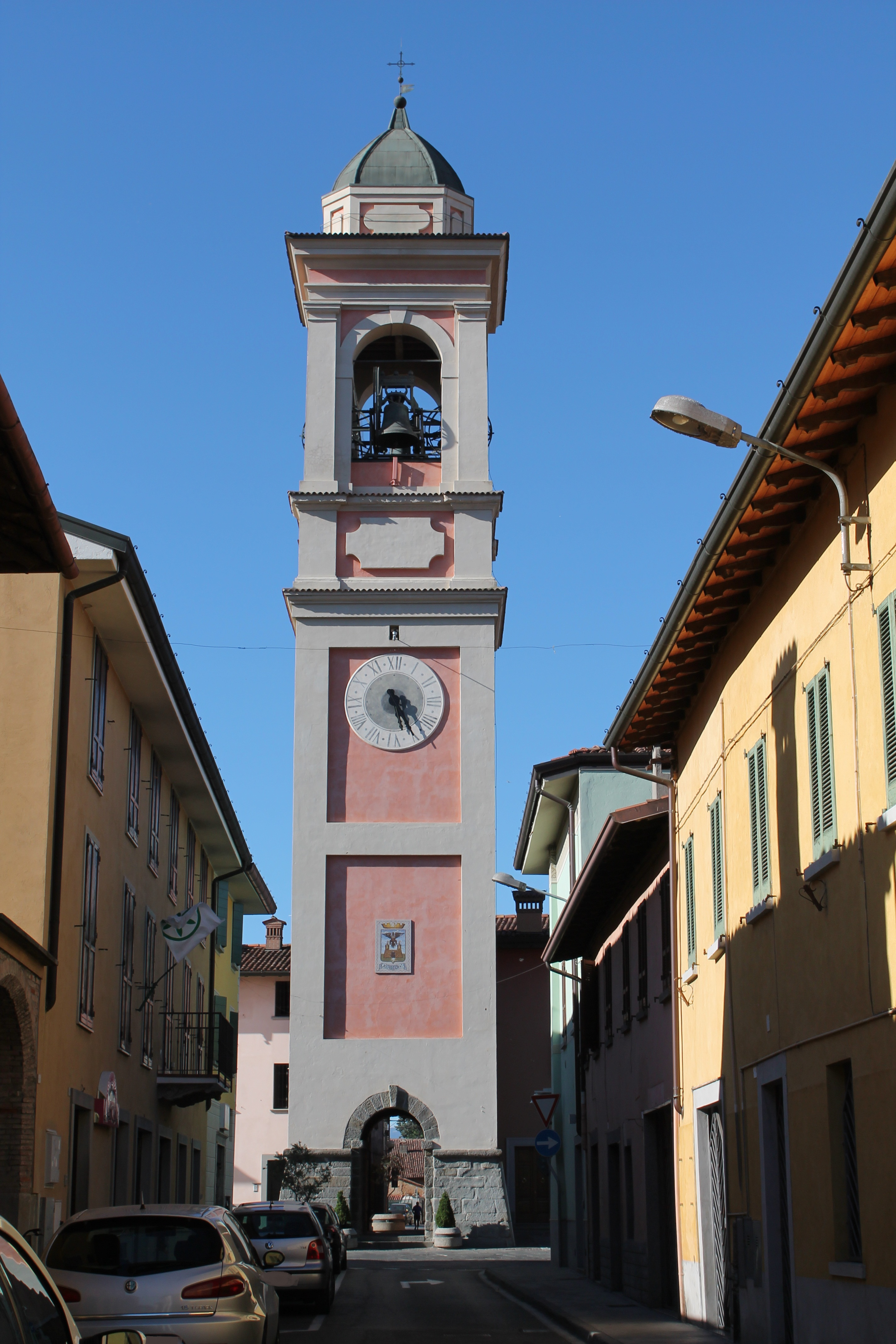 La Torre di Castelcovati.